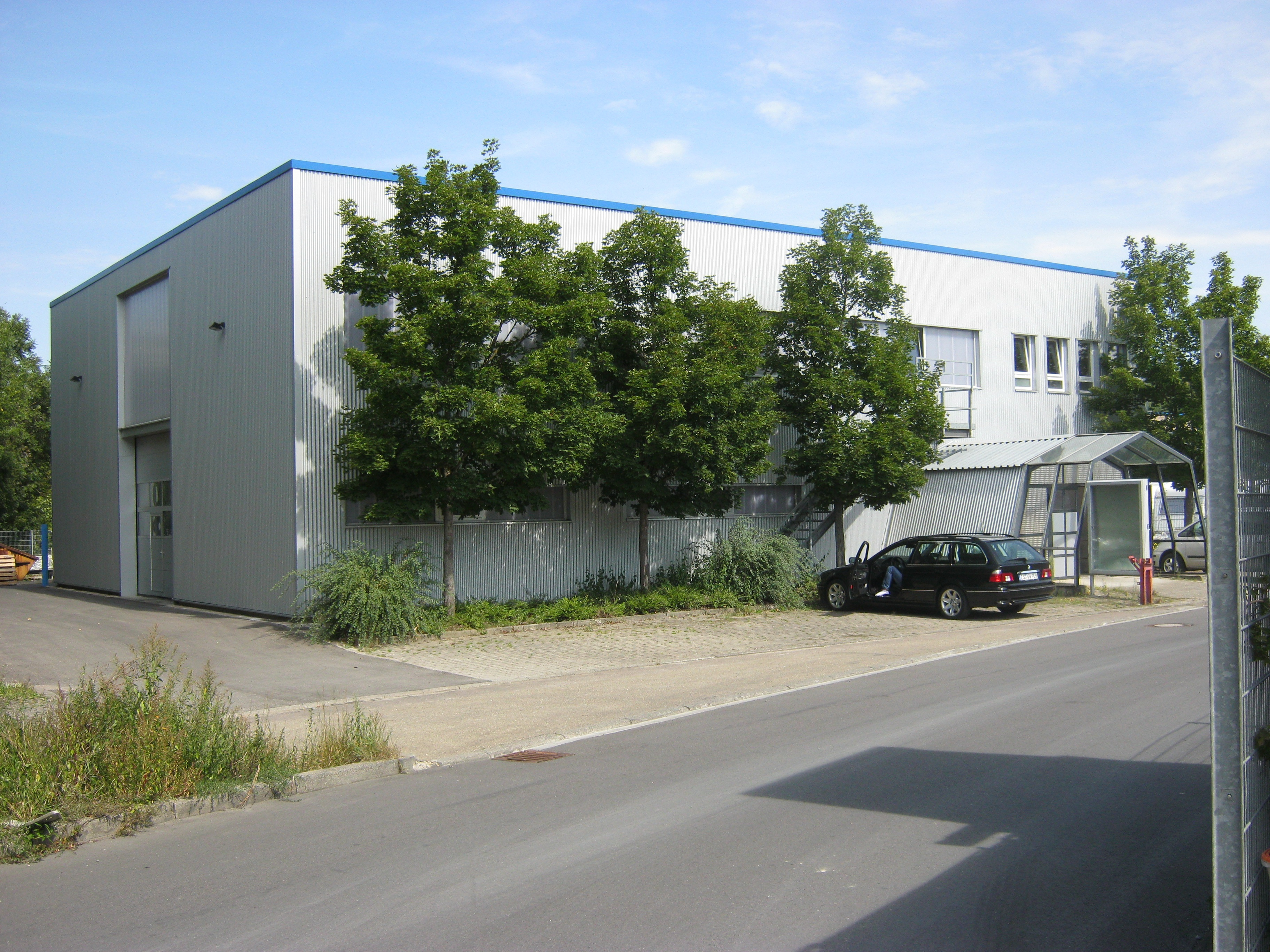 Einstige Diskothek "Skylab" in Frickenhausen - OpenStreetMap(Info)